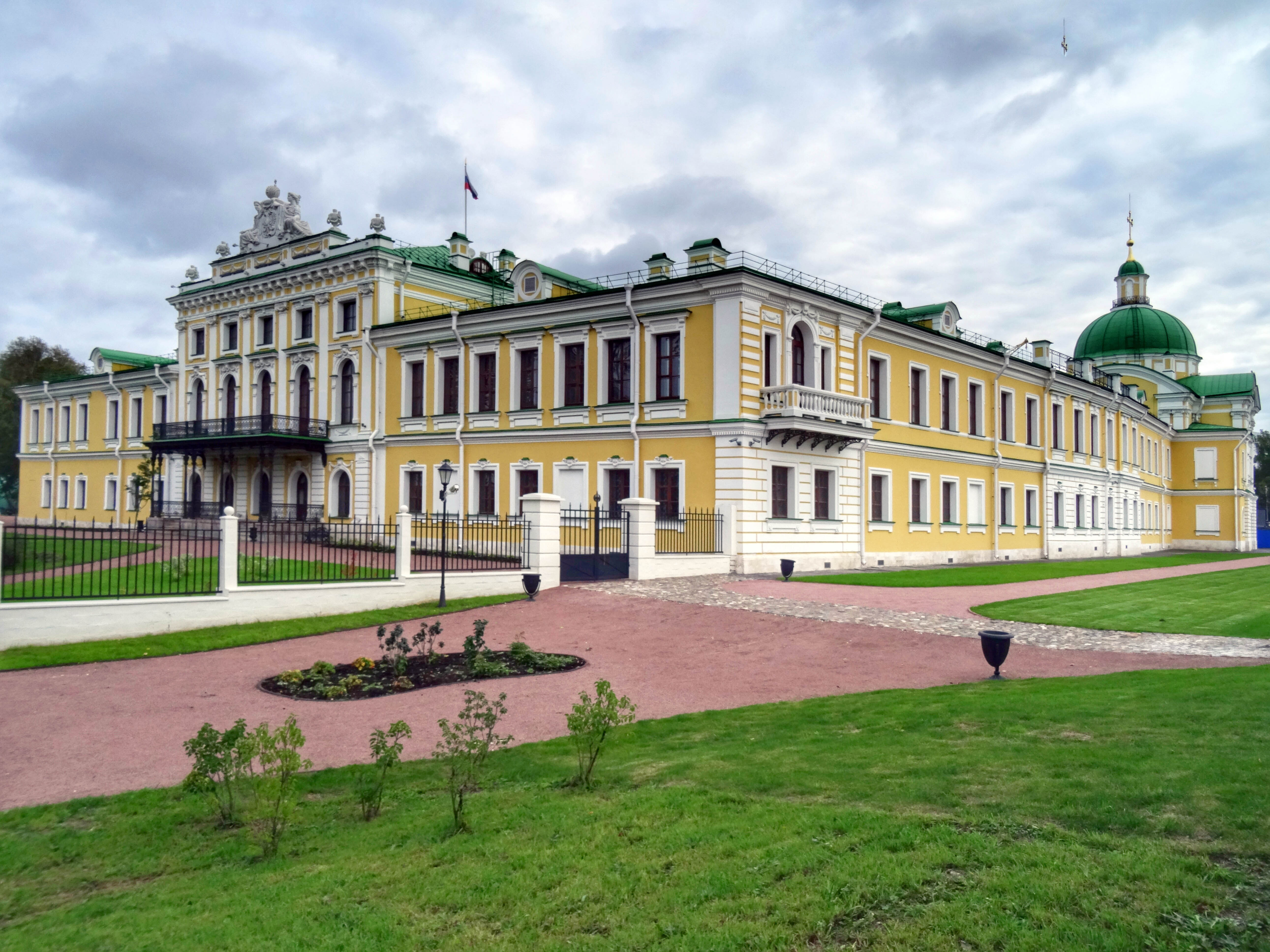 Путевой дворец (главный корпус): улица Советская, 3, Тверь, Тверская область